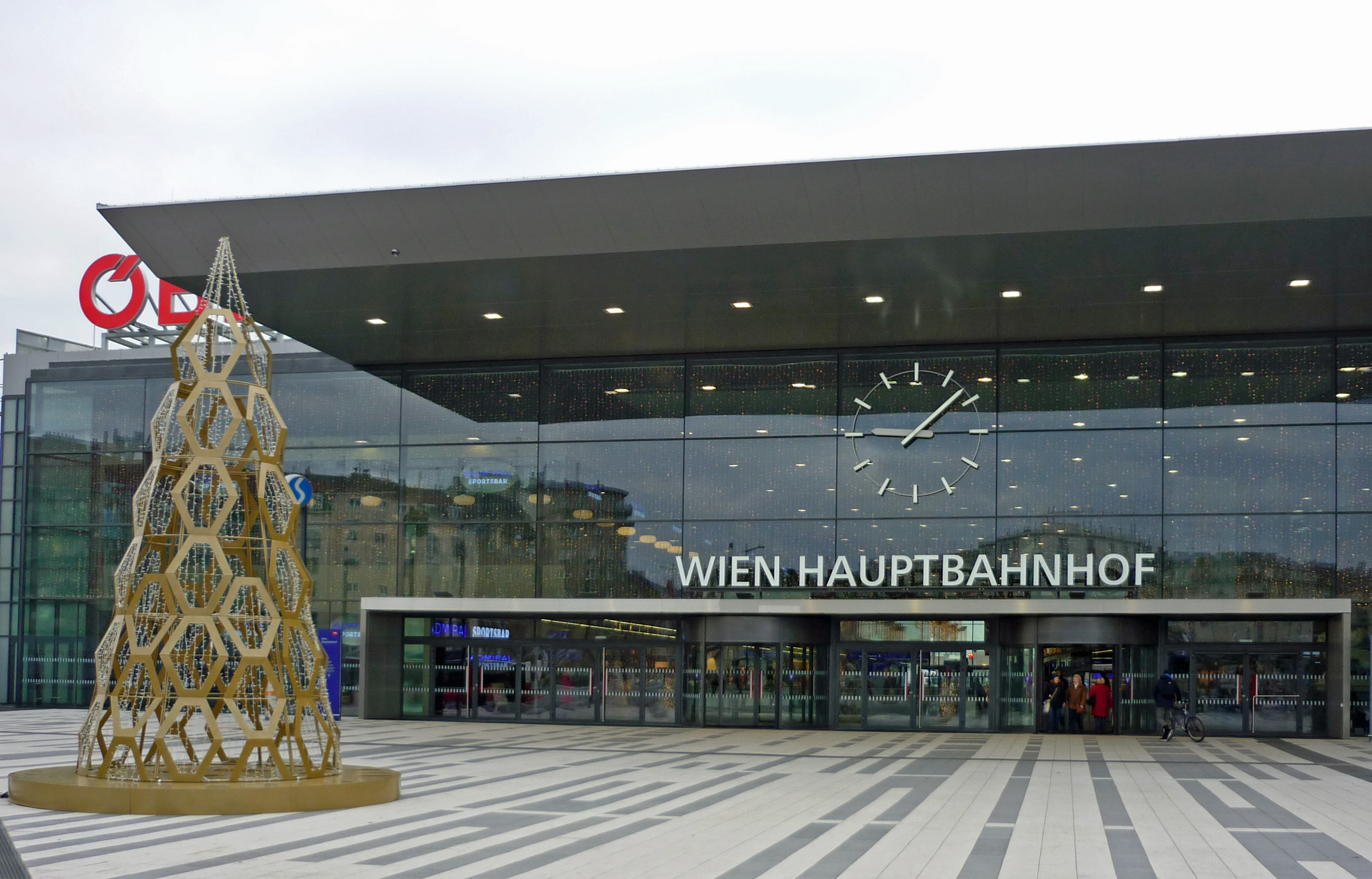 Der neue Hauptbahnhof von Wien, Haupteingang